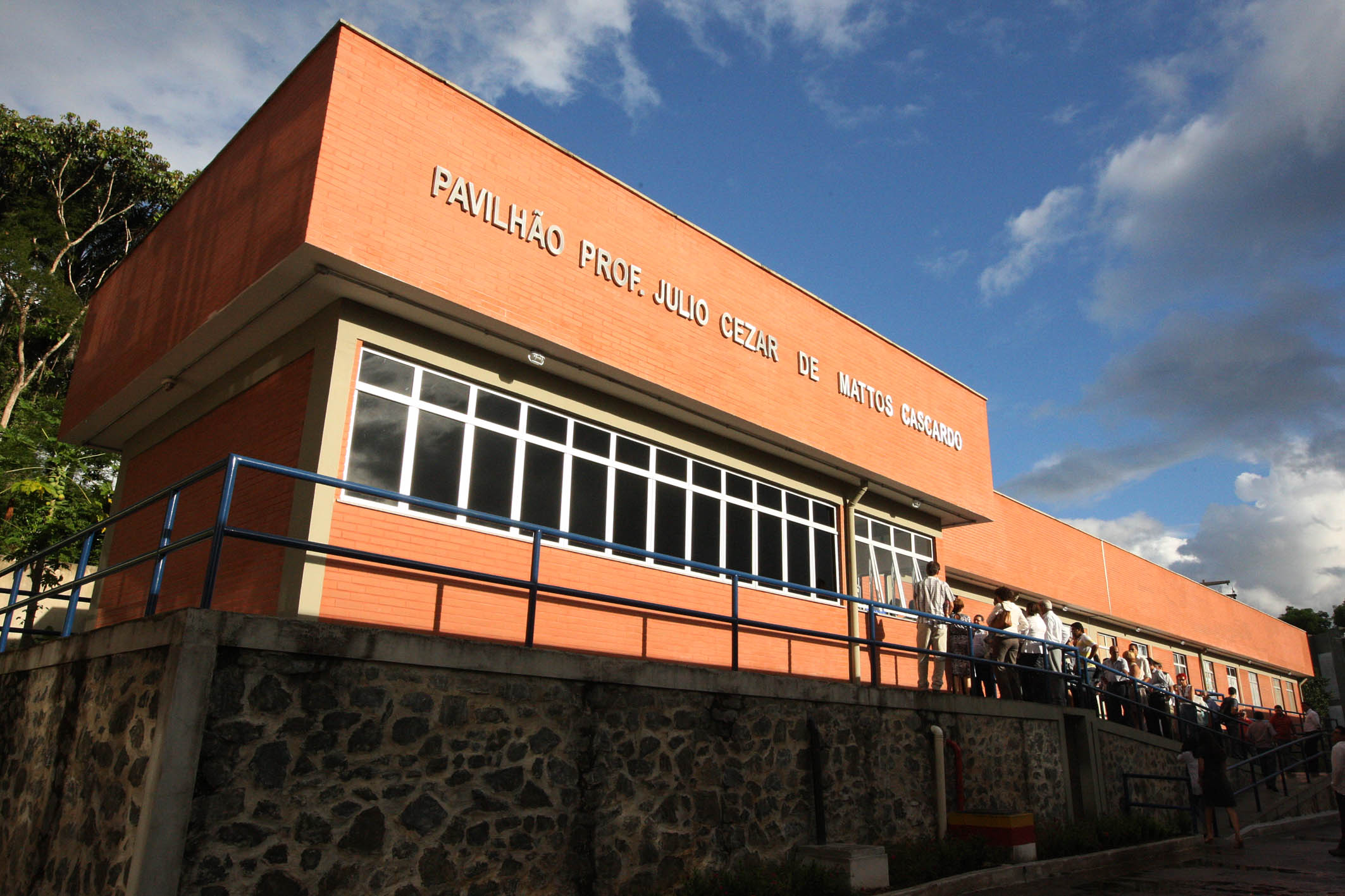 Inauguração da ampliação da UESC em Ilhéus. Foto: Mateus Pereira/SECOM